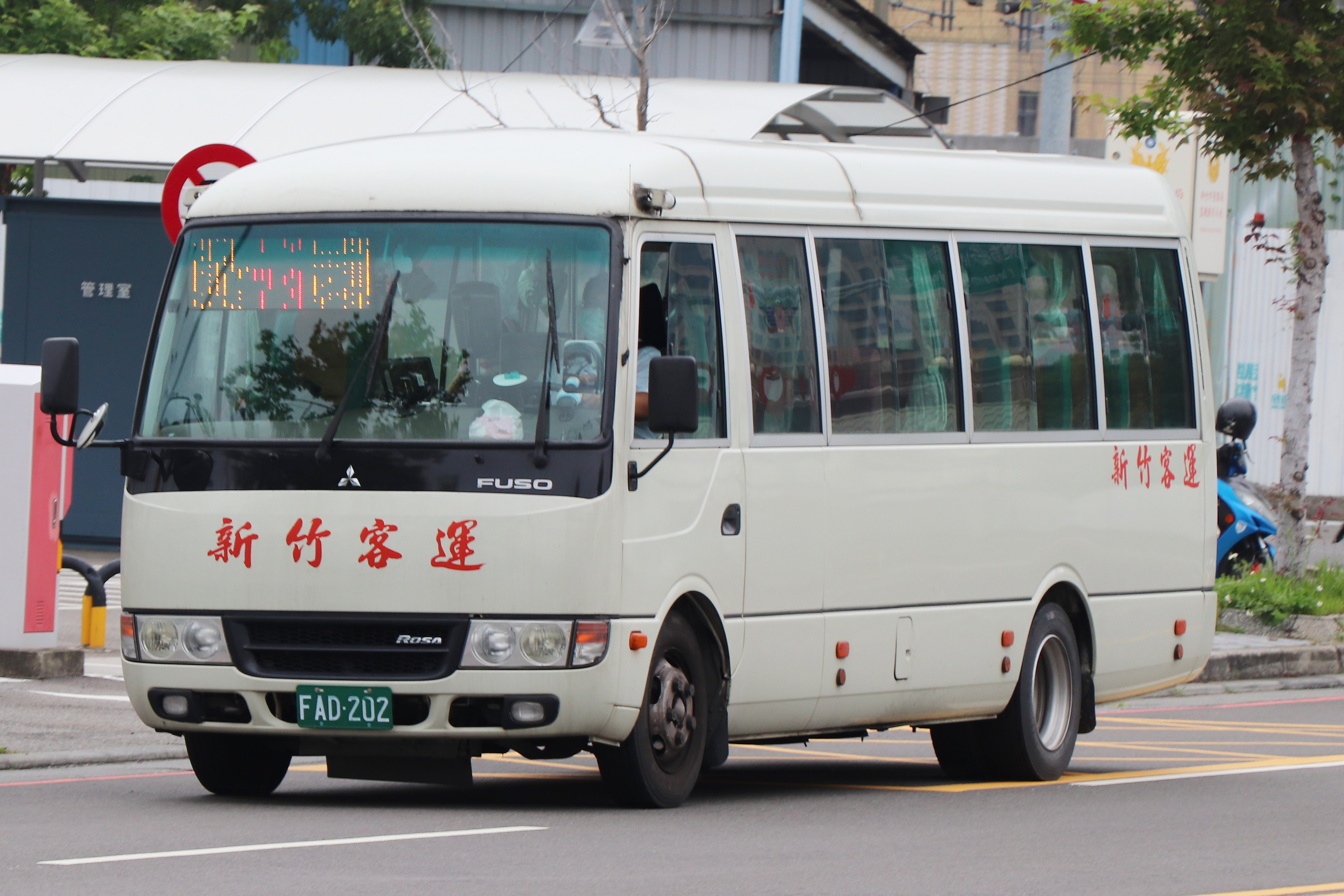 新竹客運 Fuso Rosa BE64DG大客車 FAD-202